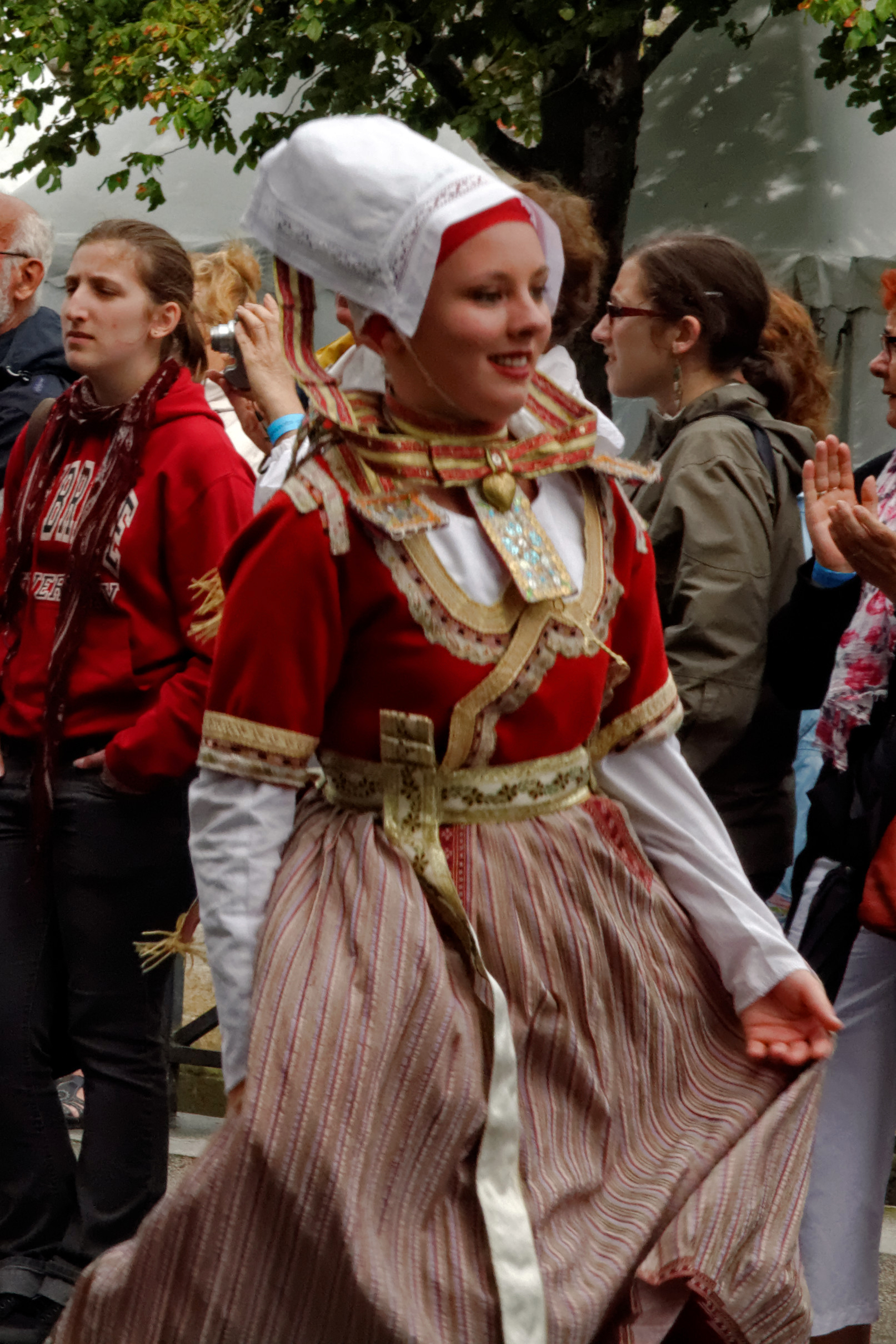 "Défilé en fête". Cercle Eostiged ar Stangala (Kerfeunteun, Quimper) lors du festival de Cornouaille 2013 le dimanche 28 juillet pour Kemper en Fête dans les rues de Quimper.